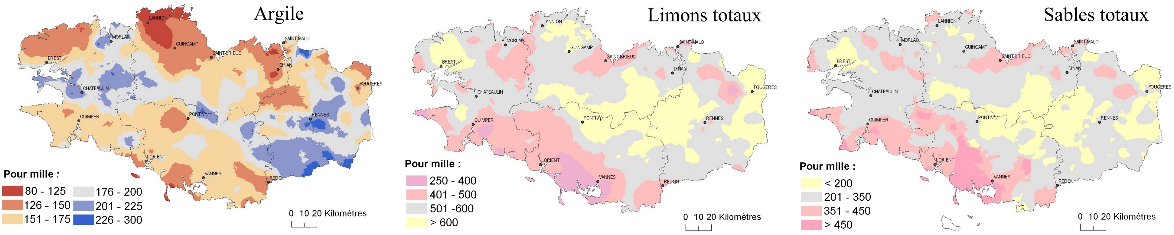 Les cartes sont obtenues par interpolation géostatistique (co-krigeage) à partir de données de profils pédologiques et d’analyses de terre agricoles.